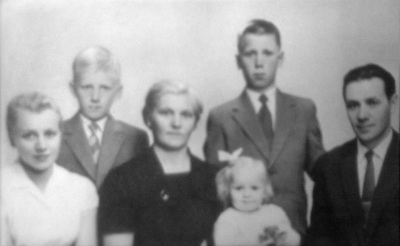 Yli-Vainion lapset ja Linnea Varkaudessa vuonna 1959. Kuvasta puuttuu Eeva, joka syntyi vuonna 1960.